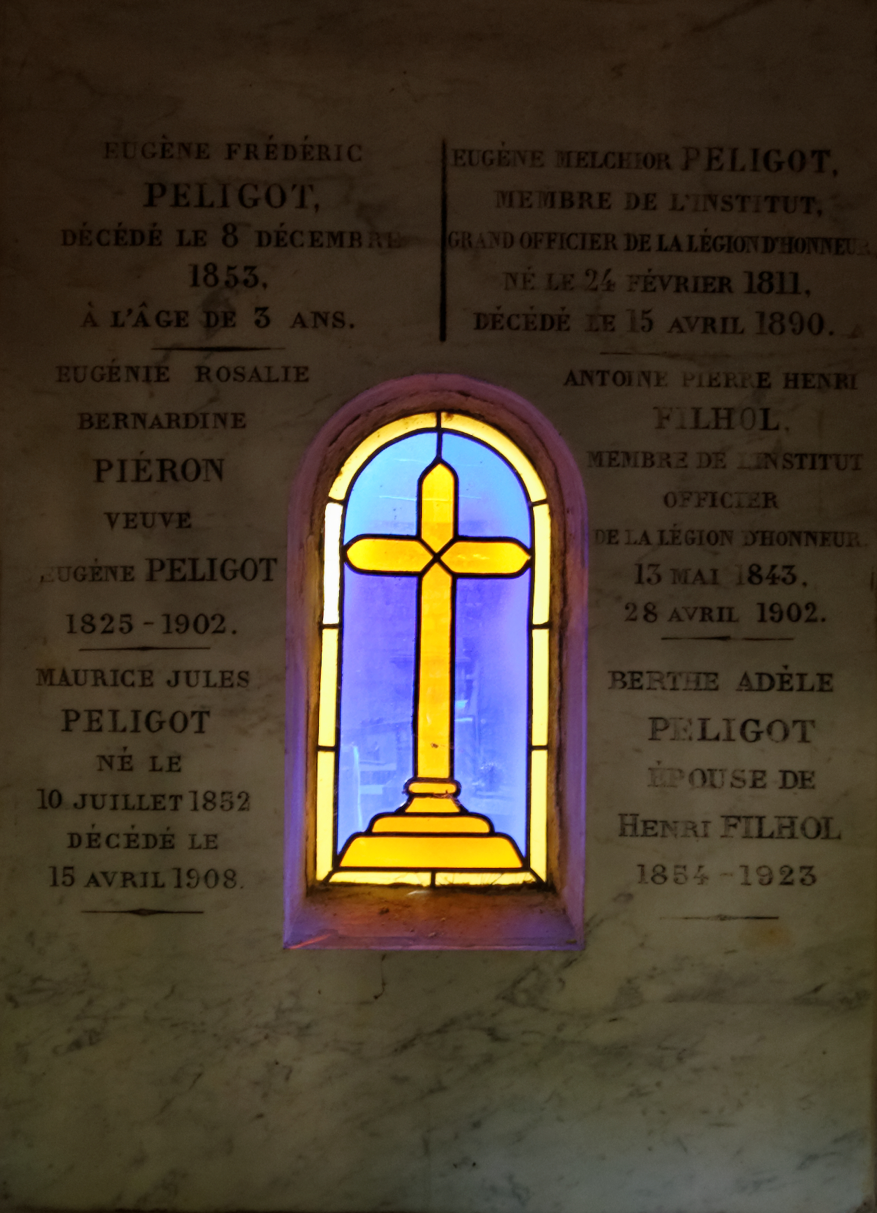 Chapelle